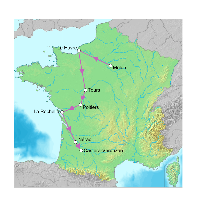 Pérégrinations de Vincent-Marie Viénot de Vaublanc sous la terreur à savoir départ de Melun pour le Havre puis de Le Havre vers Tours, Tours vers Poitiers, Poitiers vers La Rochelle, La Rochelle vers Nérac à coté de Bordeaux, et enfin de Nérac à Castéra-Verduzan dans le département du Gers.